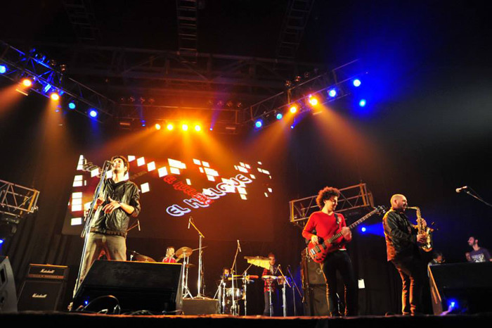 El Kuelgue en vivo, 2015.